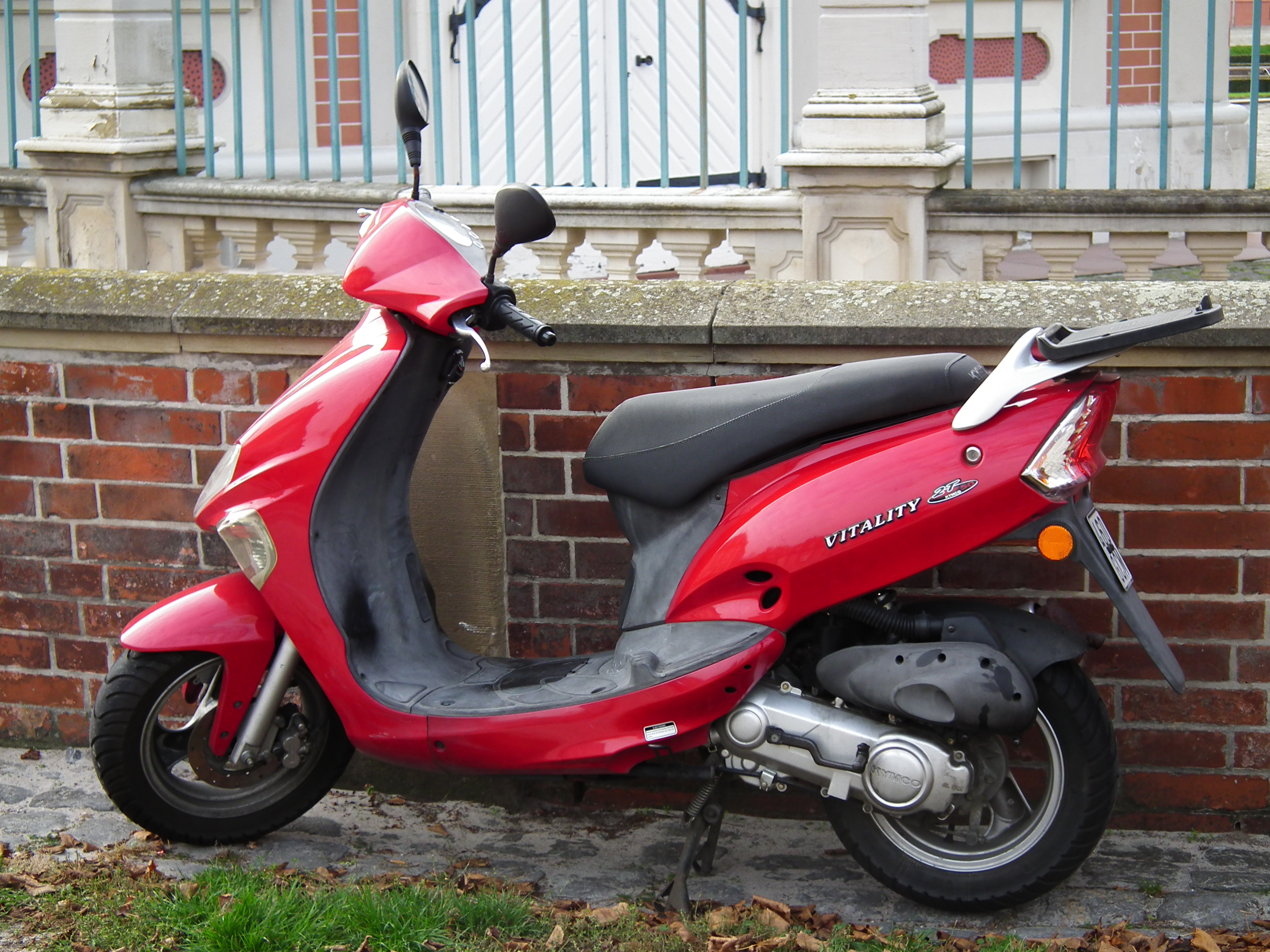 KYMCO Vitality Moped, fotografiert in Baden-Württemberg, Deutschland)